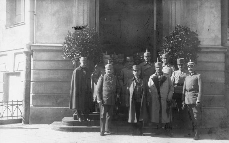 Warschaus Generalgouverneur in Lublin Von links: Generalgouverneur von Beseler, Generalgouverneur Kuk, Generalmajor von der Esch. Besuch des Warschauer Generalgouverneurs in Lublin 13. Dezember 1916 [Herausgabedatum] Information added by Wikimedia users.